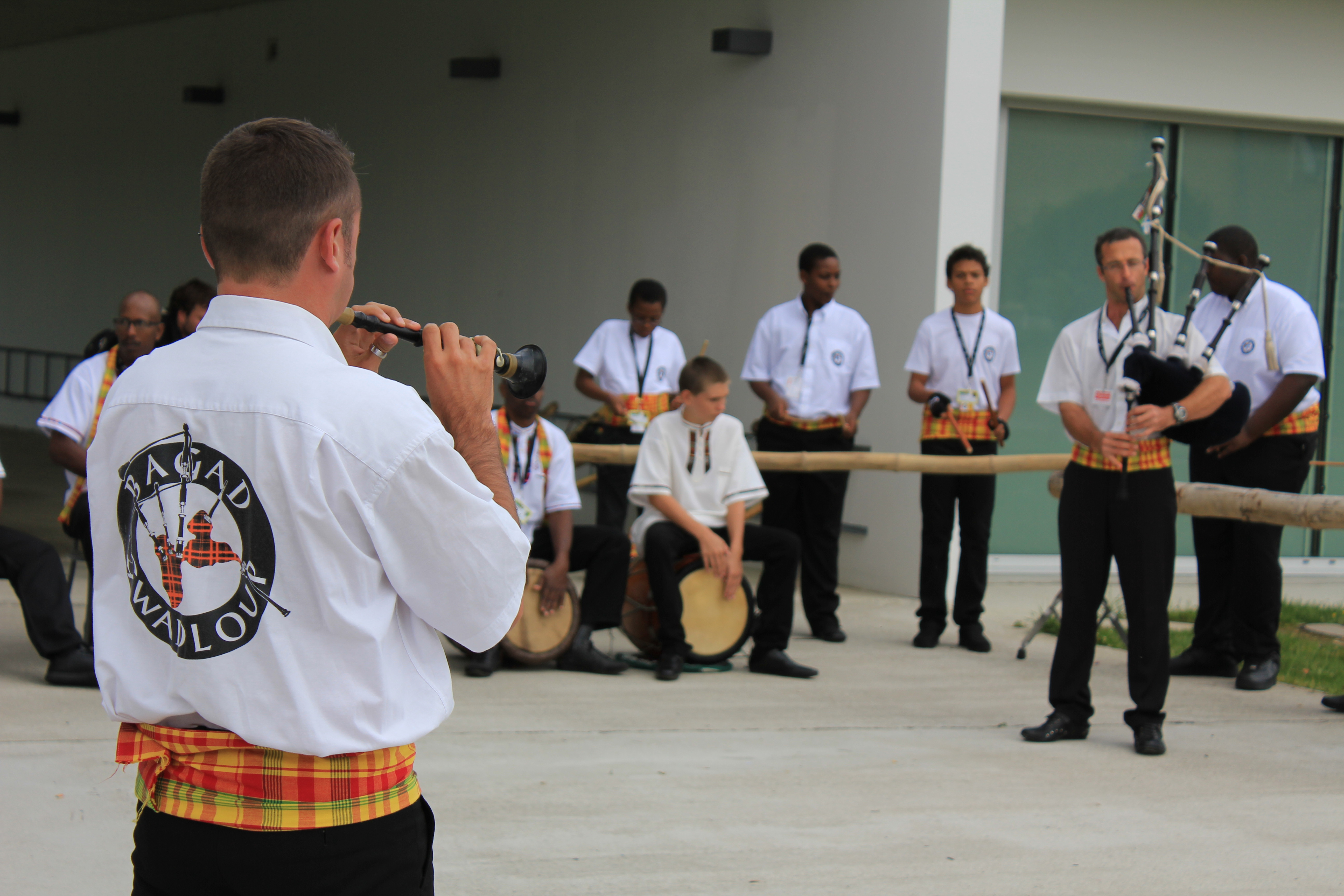 Bagad Gwadloup au Festival Interceltique de Lorient, 2011.